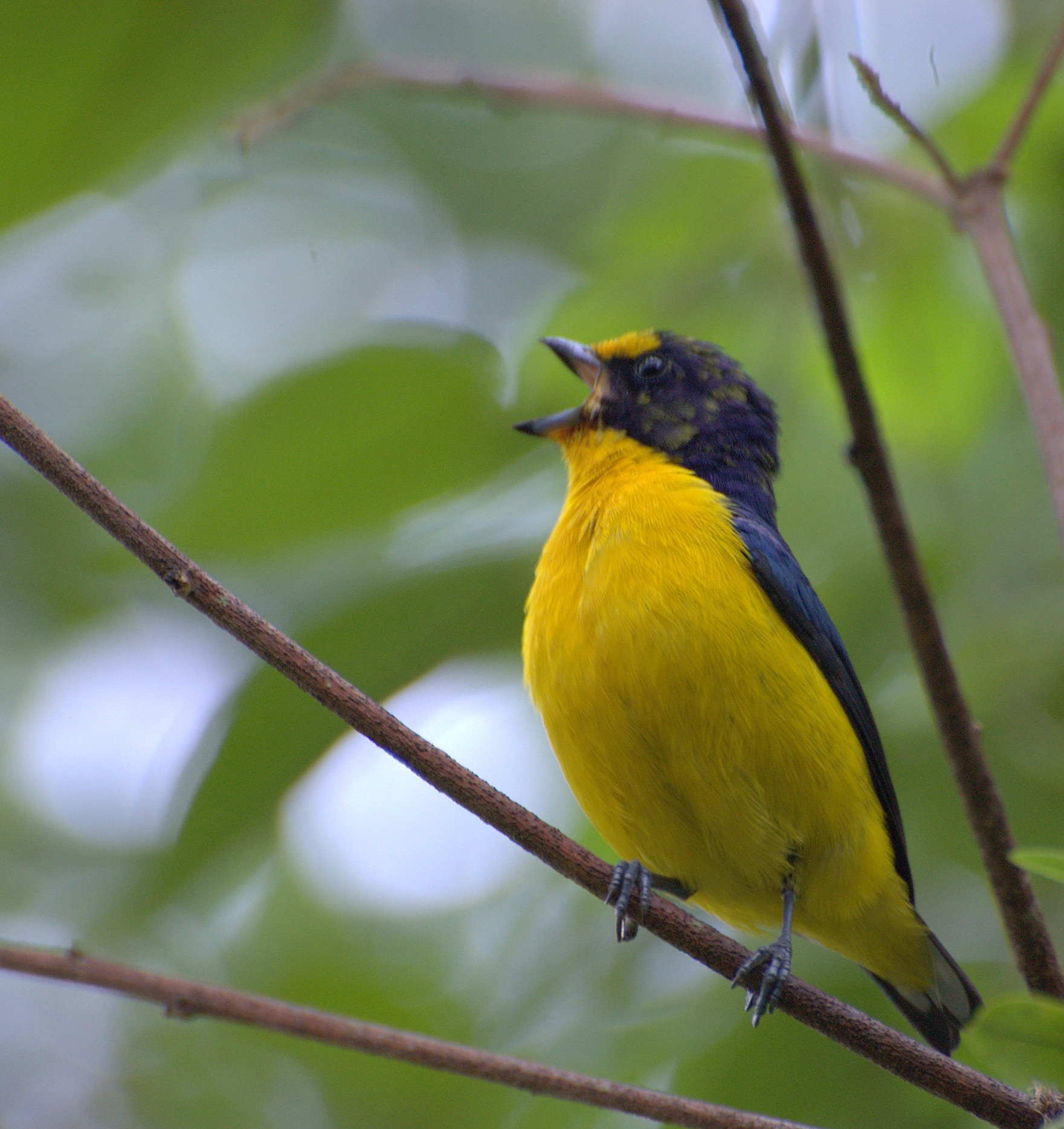 No quintal da minha sogra na cidade de Registro-SP